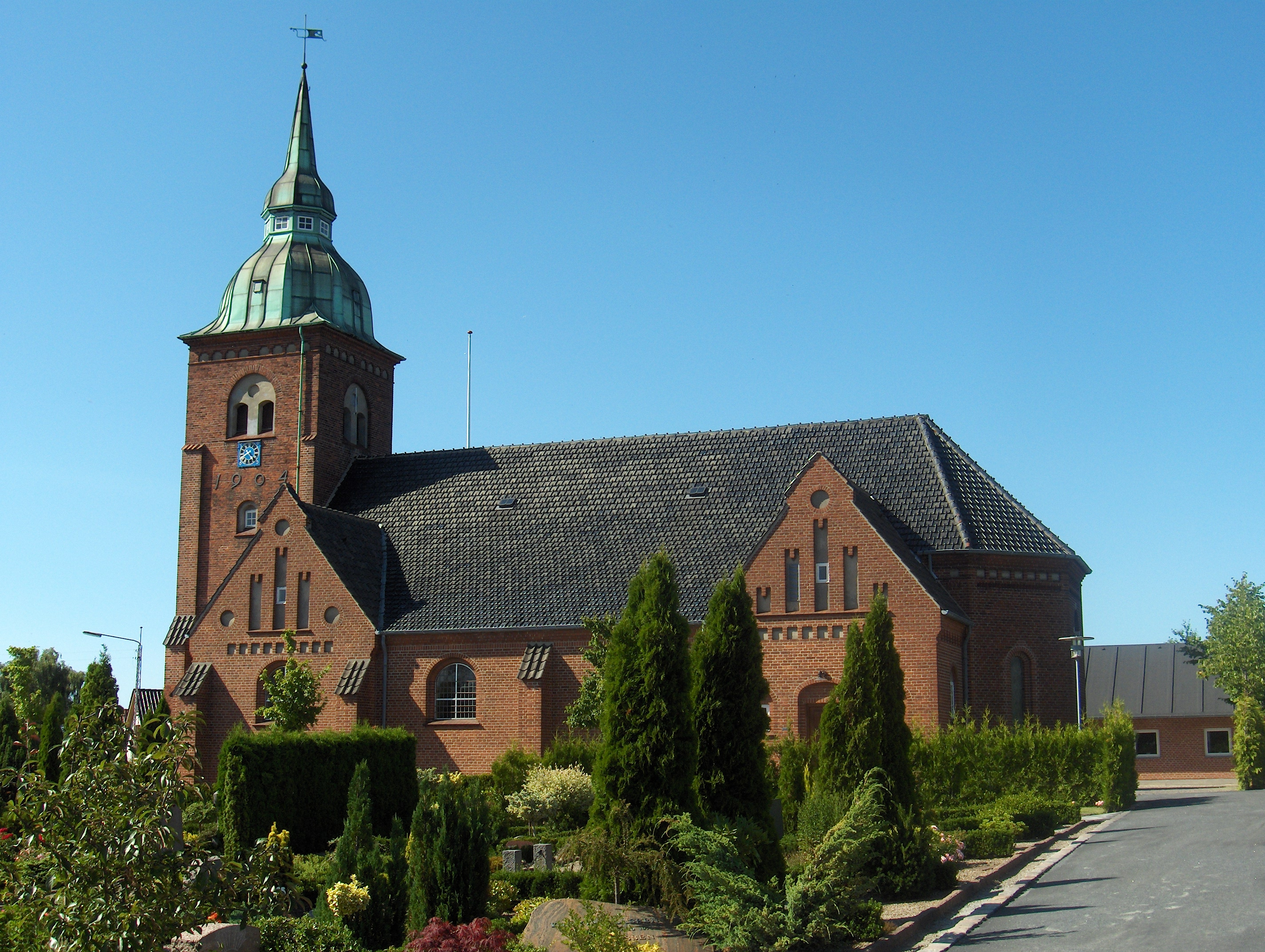 Vejgaard Kirke i Aalborg